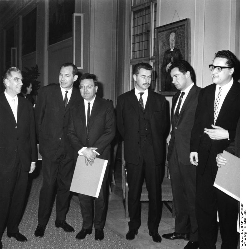 18.3.1964 Berlin/West In Vertretung des Senators für Wissenschaft und Kunst verlieh der Senator für Schulwesen, Carl Heinz Evers, im Kammersaal des Rathauses Schöneberg den diesjährigen"Berliner Kunstpreis-Jubiläumsstiftung 1848/1948 und den Preis "Junge Generation". v.l.n.r.: Prof. Hans Chemin-Petit, Berliner Kunstpreis für Musik, Willian Dooley, Bariton, Preis "Junge Generation" für Darstellende Kunst, Wolfgang Neuss, "Berliner Kunstpreis" für Film und Fernsehen, Rolf Henniger, Staatsschauspieler, "Berliner Kunstpreis" für Darstellende Kunst, Peter Lilienthal, Regisseur, Preis "Junge Generation" für Film und Fernsehen, Lothar Koch, Solo-Oboist, Preis "Junge Generation" für Musik, Werner Dittmann, Senatsbaudirektor, Architekt